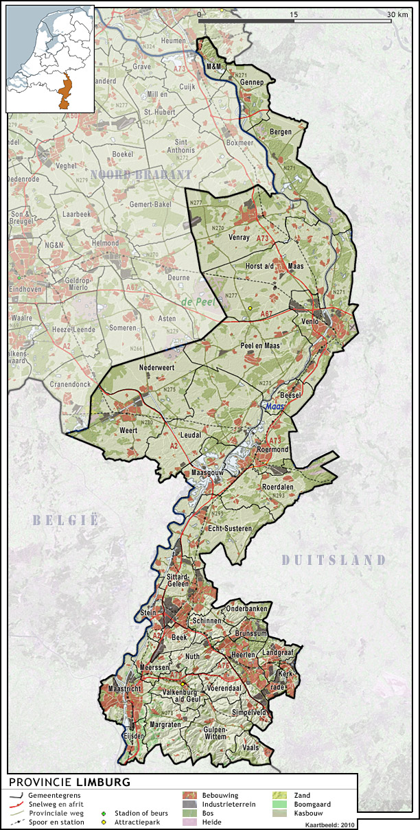 Provincie Limburg, met indeling van gemeenten (2010) en impressie van het landschap. Door Jan-Willem van Aalst, samengesteld uit publiek beschikbare geo-data: Referentie-ondergrond (kustlijn, steden, wegen) gerasterd uit de OpenStreet Map OSM. ( Inhoud is beschikbaar onder de Creative Commons Attribution-ShareAlike 3.0 license. Referentie-ondergrond op water bewerkt vanuit Gebruik is vrij met bronvermelding NLR en ESA. Vectorgrenzen van gemeenten en regio's vrij ter beschikking gesteld met dank aan cartografen van brandweerregio's Hollands-Midden en IJsselland; gerasterd in Photoshop. Hoogte-aanduidingen (reliëf) gerasterd uit de AHN Viewer ( gebruik is vrij met bronvermelding (c) AHN, Overige kenmerken op de kaart: eigen tekenwerk van Jan-Willem van Aalst, op basis van gerasterde gemeentegrenzen.